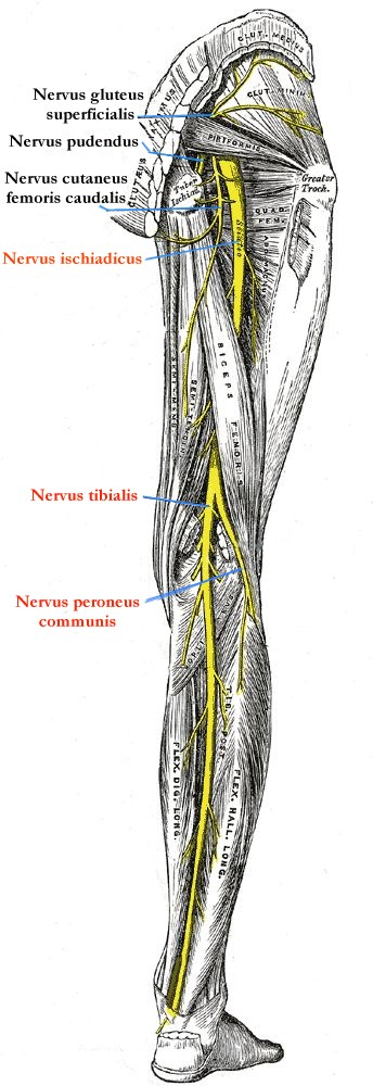 Nervus ischiadicus, Image:Gray832.png, nachbearbeitet und Beschriftung modifiziert (Deutsch/german) von Benutzer:Uwe Gille